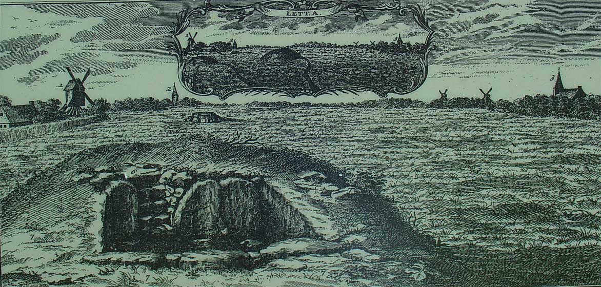 Prent van Hunebed D11 tussen Eext en Anloo